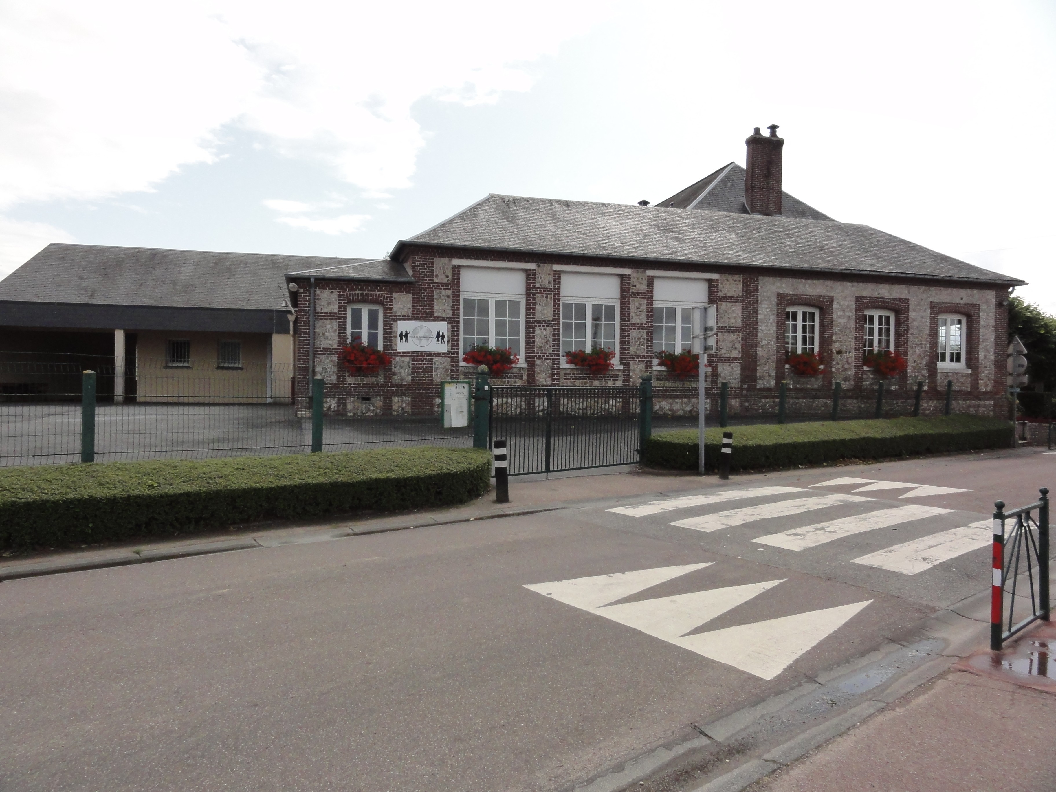 Hautot-Saint-Sulpice (Seine-Mar.) école